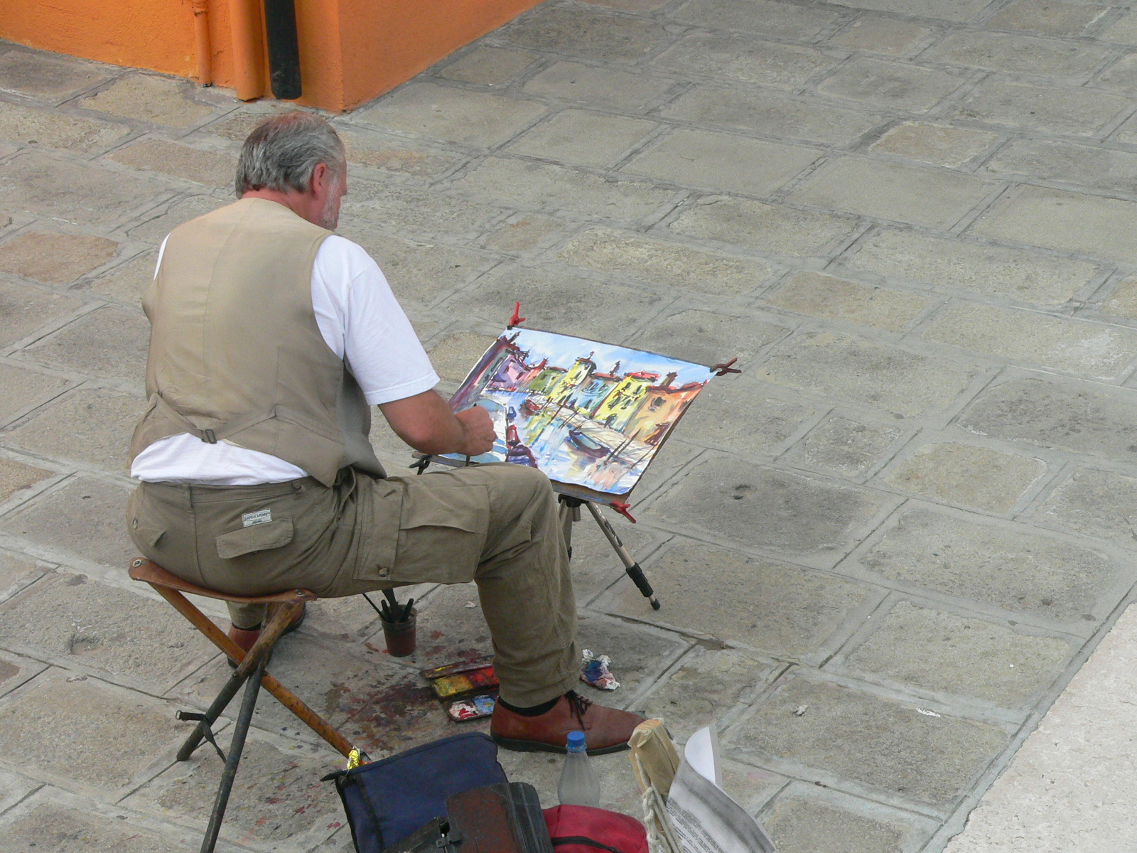 Festőművész egy buranói csatorna partján